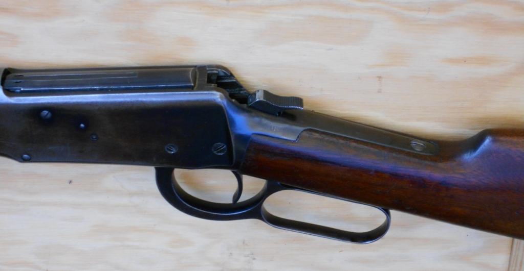 Winch M 94 Verschluss